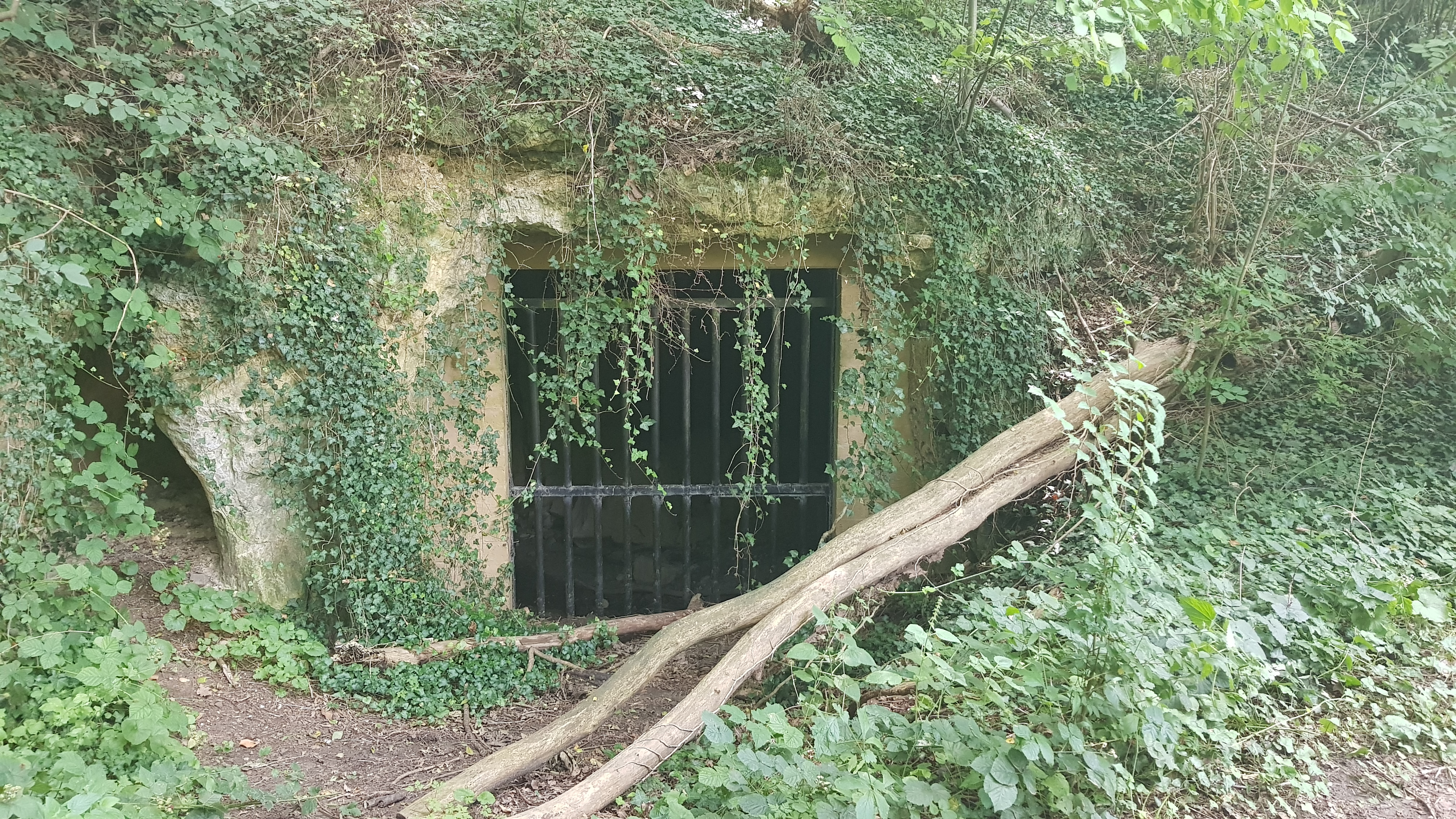 Kleinberggroeve Zuid in Savelsbos, Gronsveld, Nederland